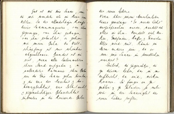 Wolfensbergers Handschrift im posthum herausgegebenen Faksimile "O Sonne!"